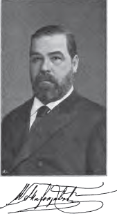 Н.С. Тихонравов (1832 - 1893) - русский литературовед и филолог